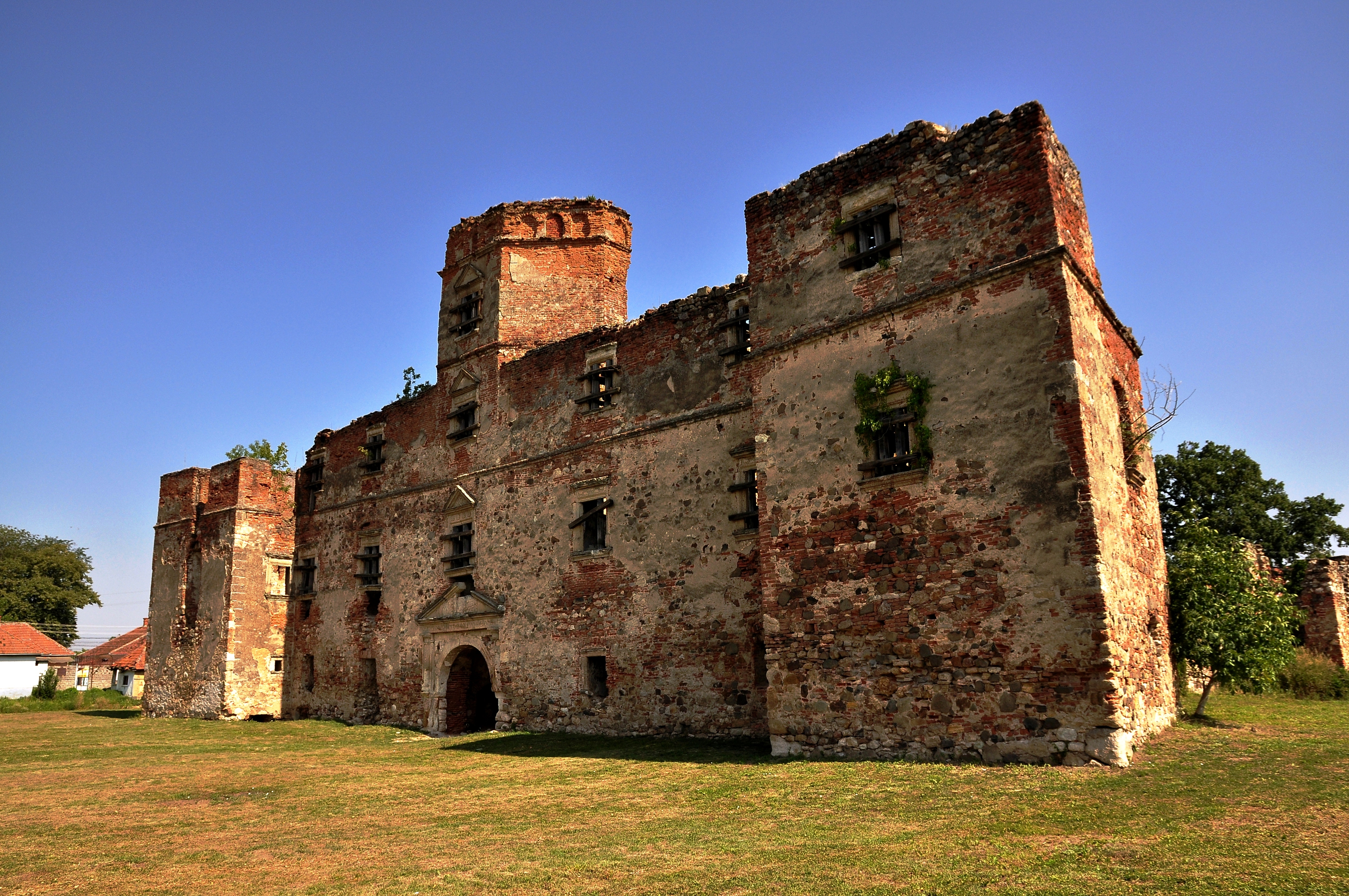 Vedere usor laterala a castelului Lonyai din Mediesul Aurit.